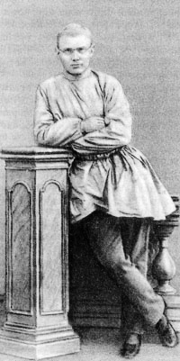 Блюммер, Леонид Петрович (1841-1888)